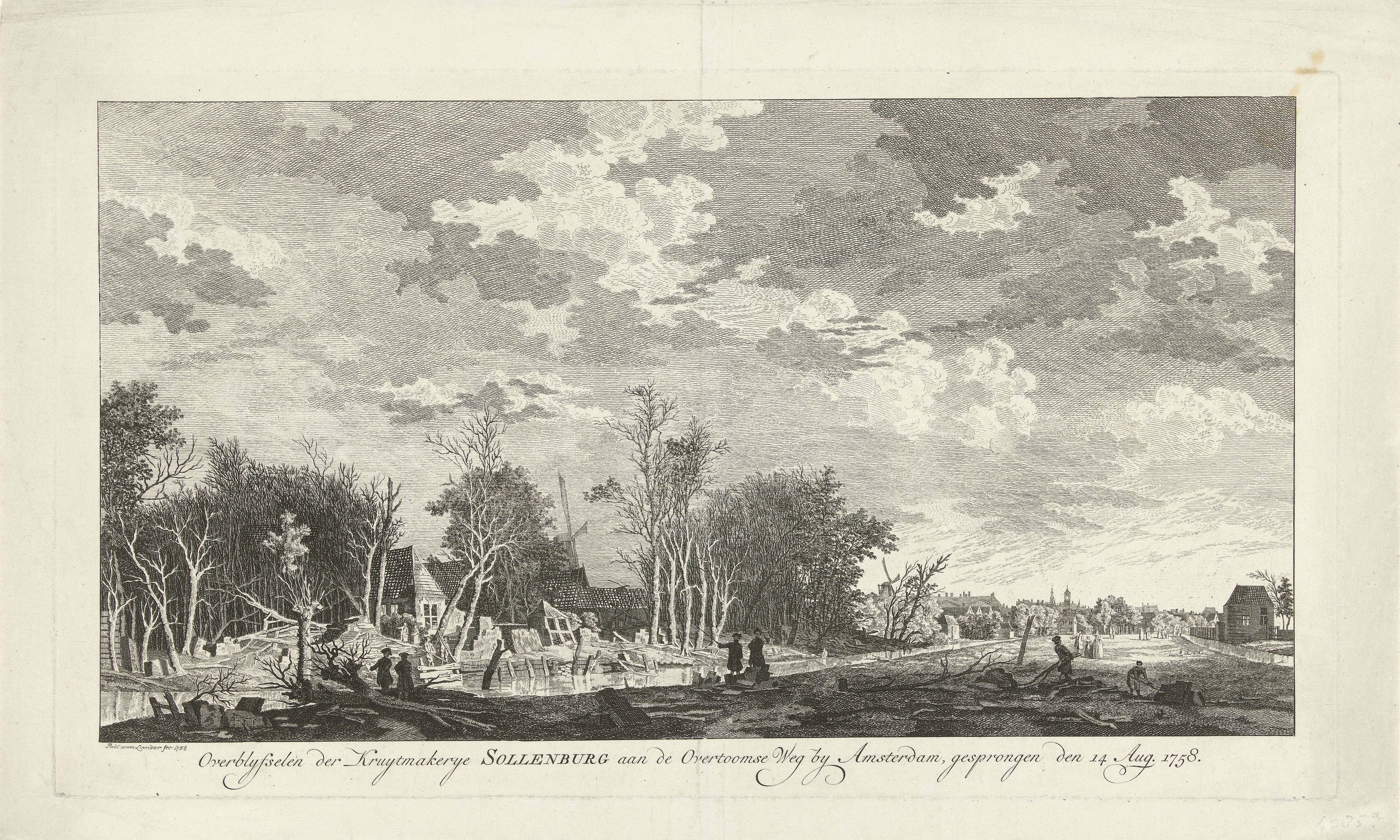 Ruïne van de kruitfabriek Sollenburg na de ontploffing op 14 augustus 1758. Overblyfselen der Kruytmakerye Sollenburg aan de Overtoomse Weg by Amsterdam, gesprongen den 15 Aug. 1758 (titel op object). De afbeelding is gemaakt ten zuiden van de Overtoom, in het achterliggende land met boerenslootje (tegenwoordig is hier het Vondelpark), kijkend baar het noord-oosten. Dus vanaf de achterzijde van de aan de Overtoom gelegen percelen. In het midden en rechts van het midden zijn twee molens te zien die aan de Overtoom staan, en rechts-achter zijn de contouren van de stad Amsterdam te zien.